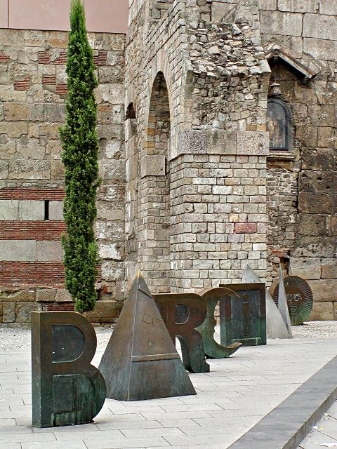 L'escultura "Bàrcino", el nom romà de Barcelona, un poema corpori de Joan Brossa. Es troba a la Plaça Nova de Barcelona, davant del Palau Episcopal. La columna que es veu al darrera preten ser la les dues darreres arcades d'un dels dos aqüeducte romans del segle I que portaven aigua a la ciutat. Aquestes arcades van quedar integrades dins de les defenses de la ciutat romana i feia segles que se n'havia perdut la memòria. A mitjans del segle XX van ser reconstruïdes sense cap criteri artístic ni arqueològic, només com a mera decoració..